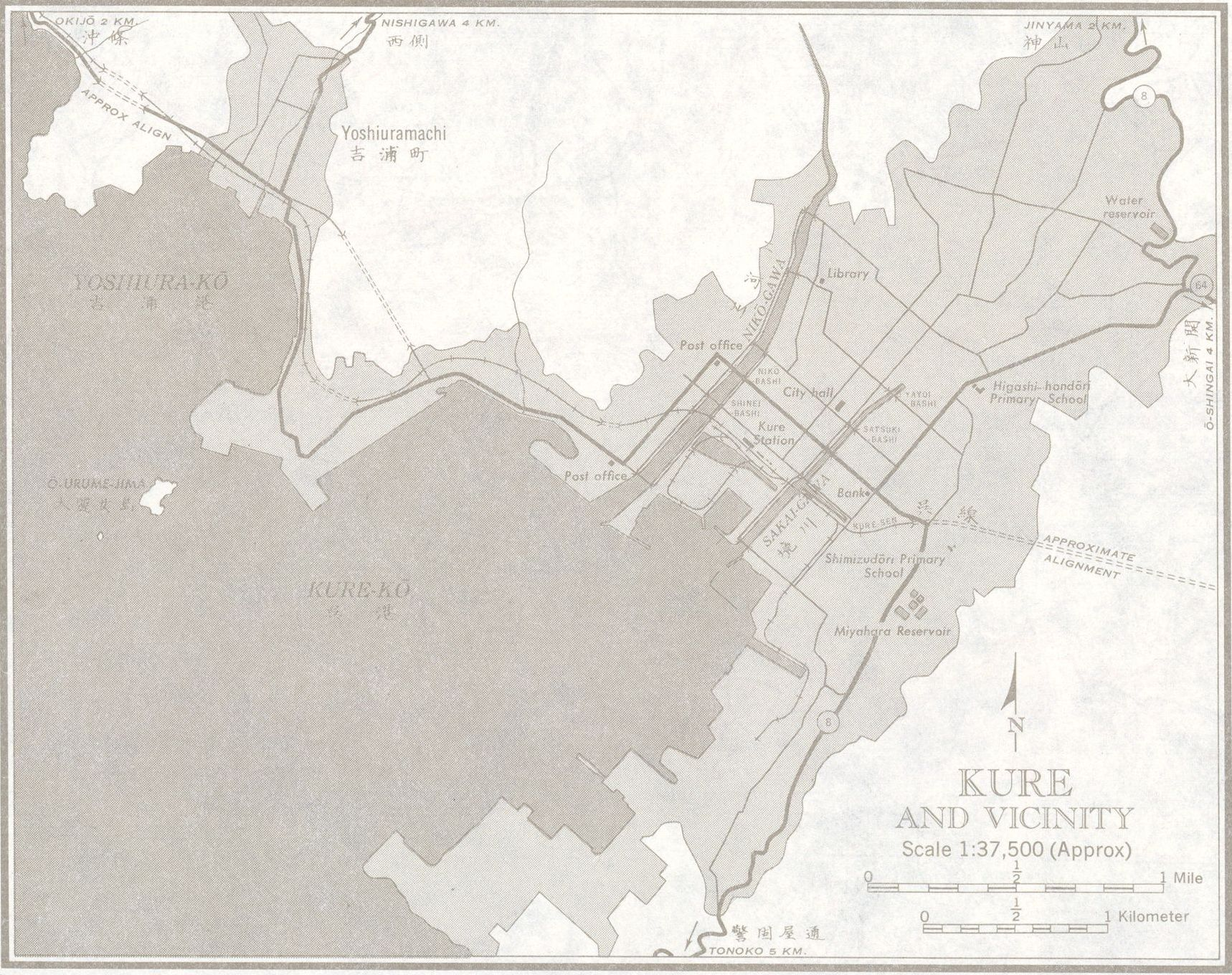 1954年以降にアメリカ軍が作成した広島県呉市中心部の地形図。必ずしも1954年時点での情報ではないことに注意。